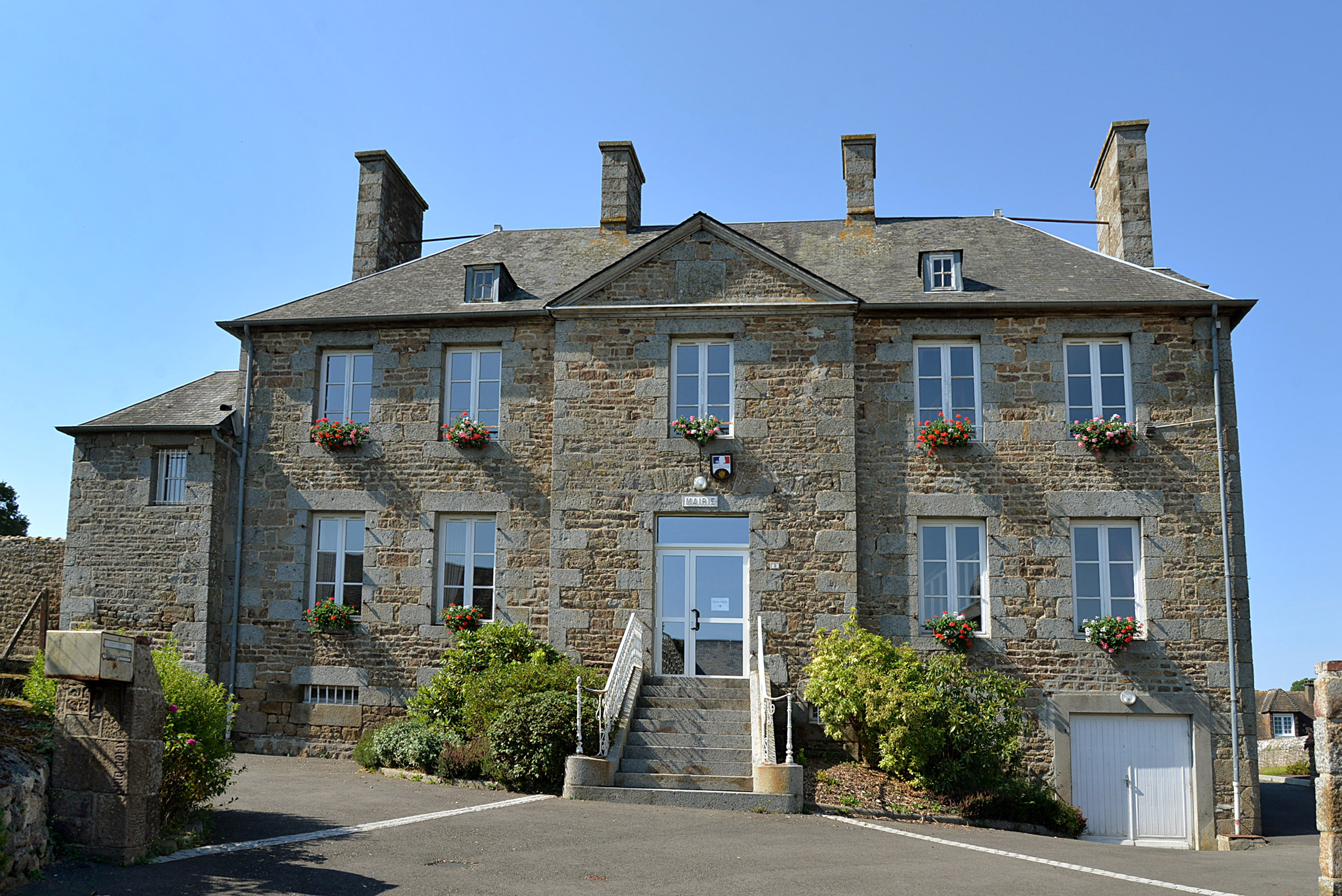 Sainte-Honorine-la-Chardonne (61)